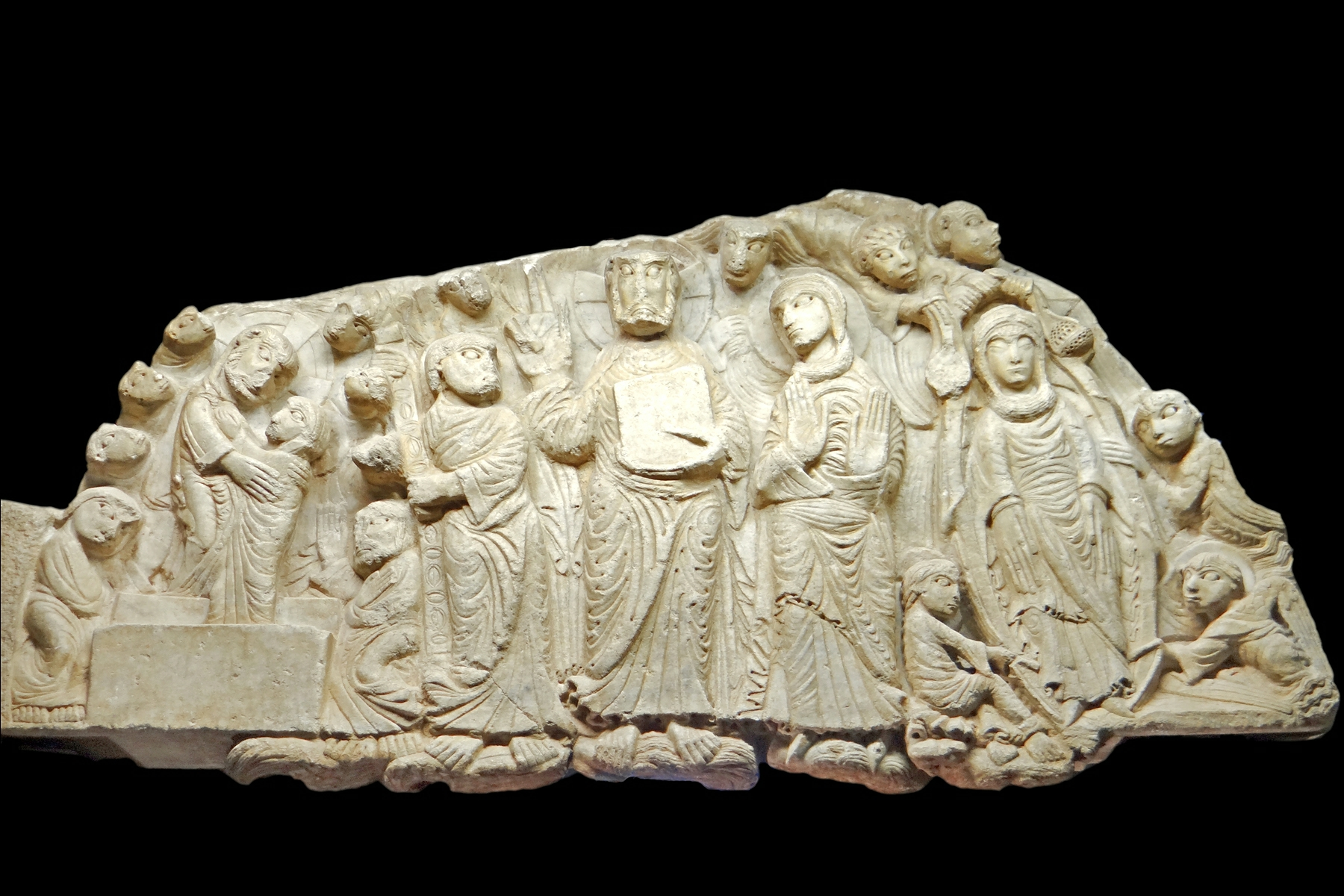 Tympan marial dans l'église Notre-Dame-des-Anges à Cabestany (66, France) Ce tympan est un vestige d'un portail disparu. Oeuvre attribuée au Maître de Cabestany XIIème siècle Marbre blanc de Céret ou de Saint-Béat Ce tympan de style roman présente les grandes caractéristiques de la sculpture du Maître de Cabestany dont le vrai nom est inconnu mais dont on trouve des oeuvres d'un style semblable dans toute la région et également en Espagne. Les visages sont étranges et anguleux, les mains surdimensionnées et les corps trapus. Cette oeuvre très remarquable consacrée à la Résurrection et à l'Assomption de la Vierge Marie avait été utilisée en remploi dans le mur d'une nouvelle église. Elle a été découverte en 1930, et est aujourd'hui exposée dans l'église Notre-Dame-des-Anges de Cabestany près de Perpignan. Le site du centre de sculpture romane de Cabestany